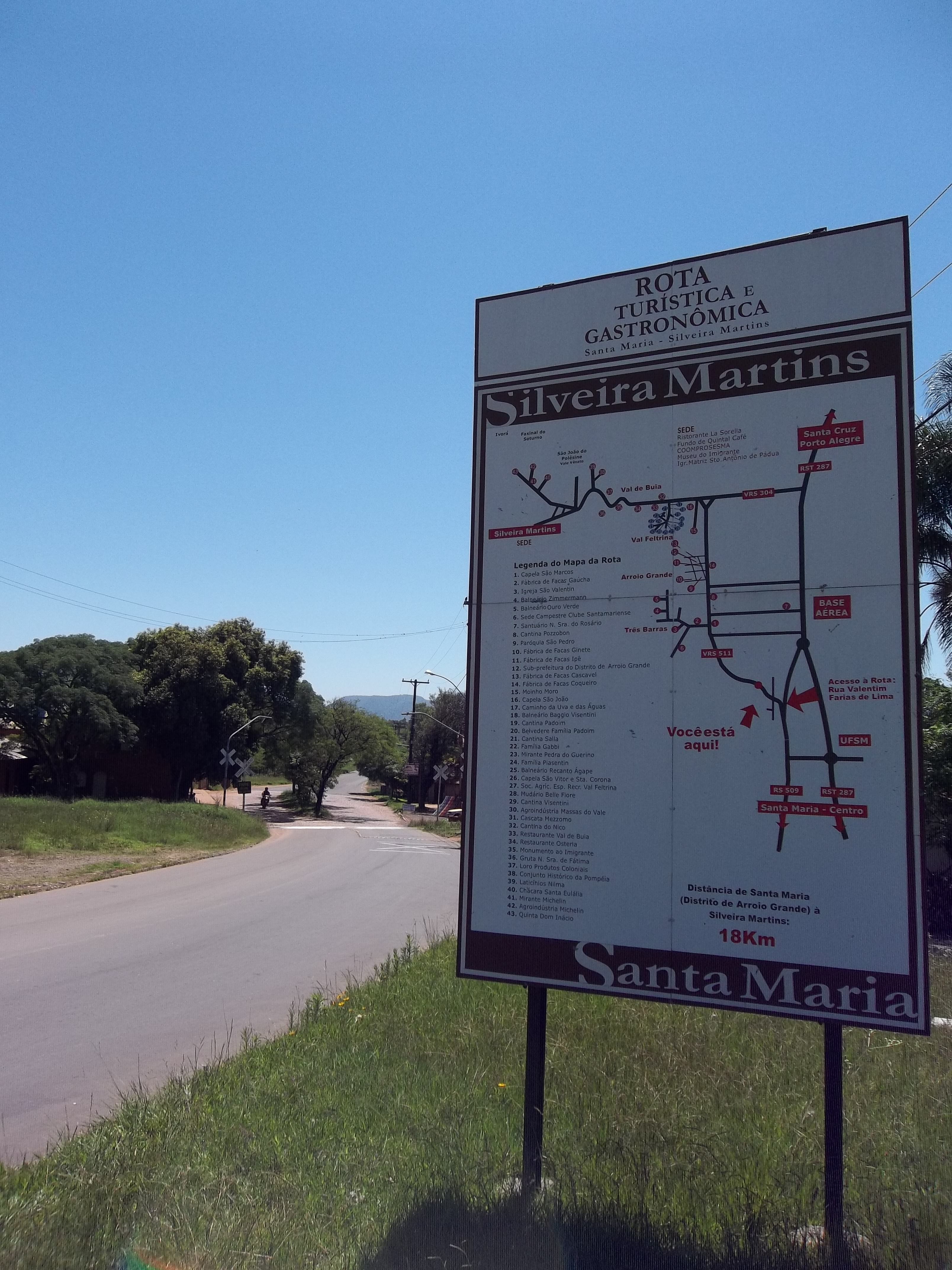 Placa de acesso à rota turística e gastronômica Santa Maria - Silveira Martins. Rio Grande do Sul. Brasil.